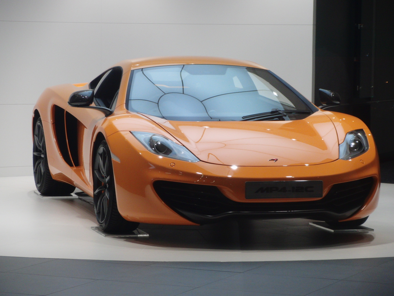 マクラーレン・MP4-12Cを撮影